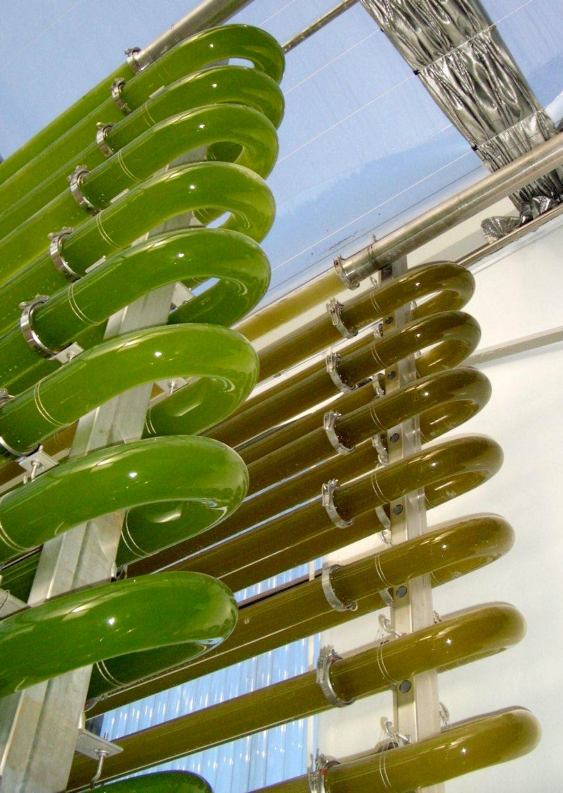 Technologie de photobioréacteur de PBR montrant la culture de deux espèces de microalgues (eau douce et marine)